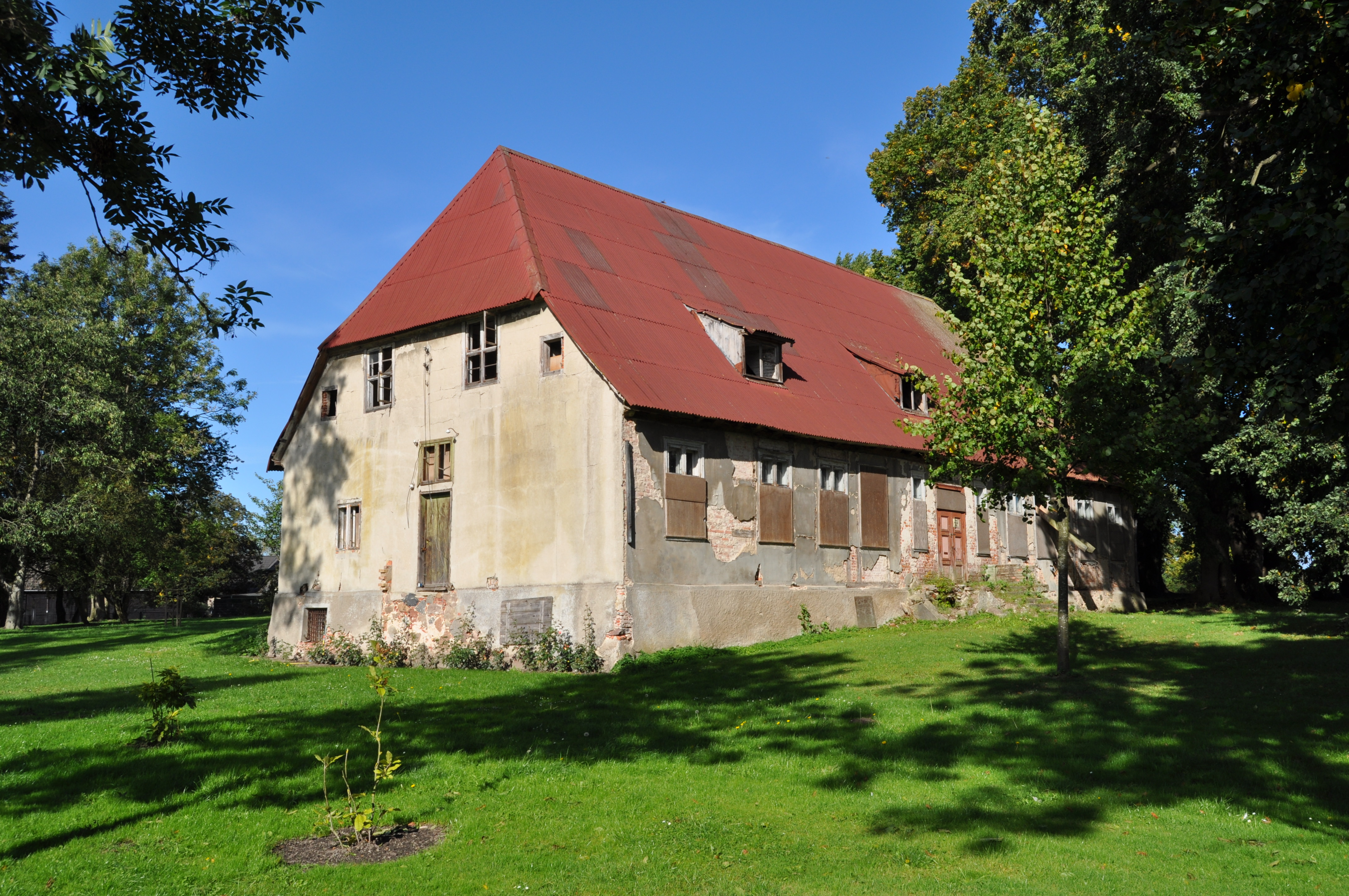 Gutshaus Owstin von SO 2012